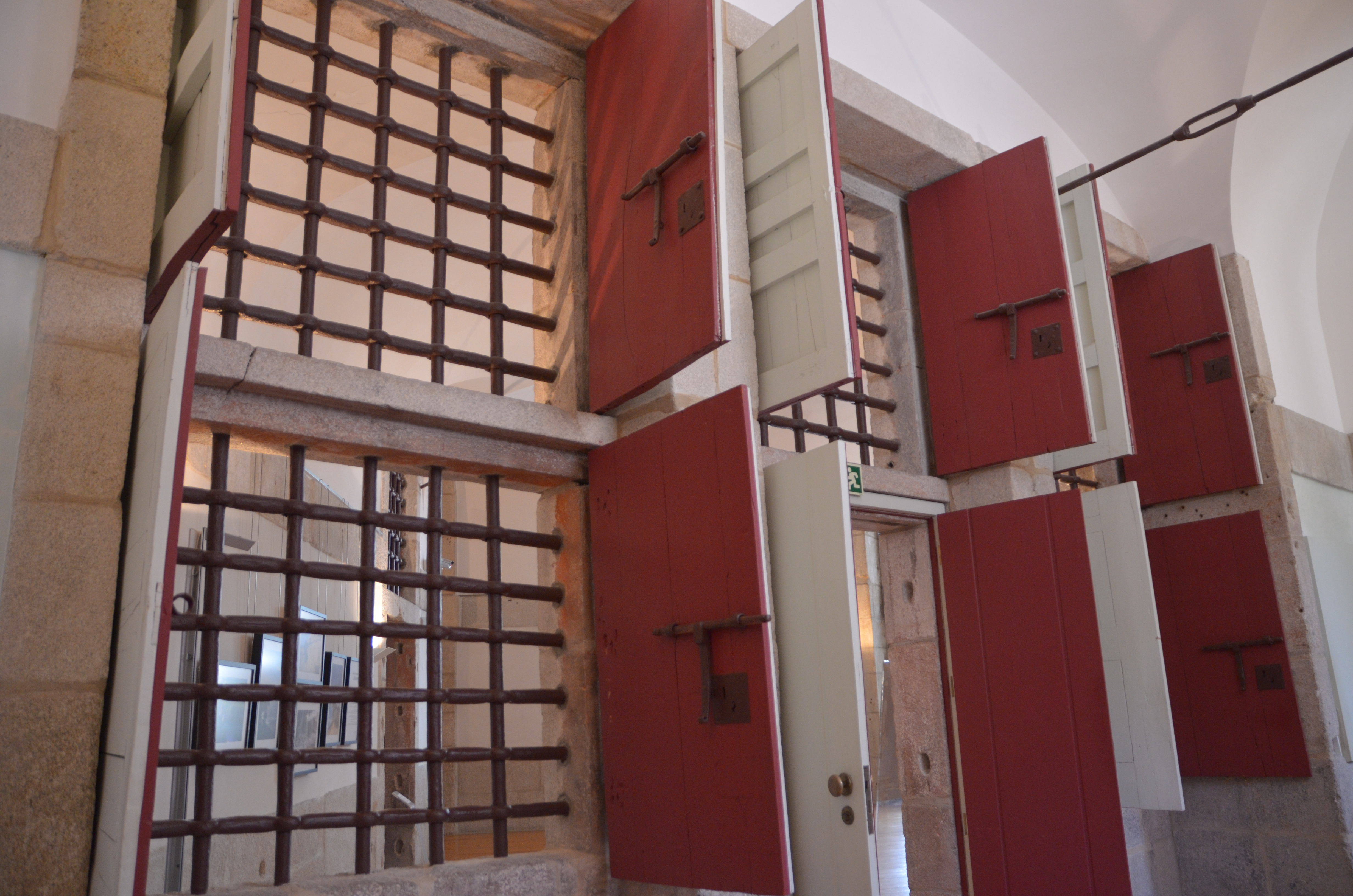 Intérieur du Centre portugais de photographies